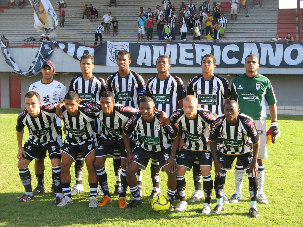 Equipe do Americano Futebol Clube, vice-campeã da Copa Rio de 2008